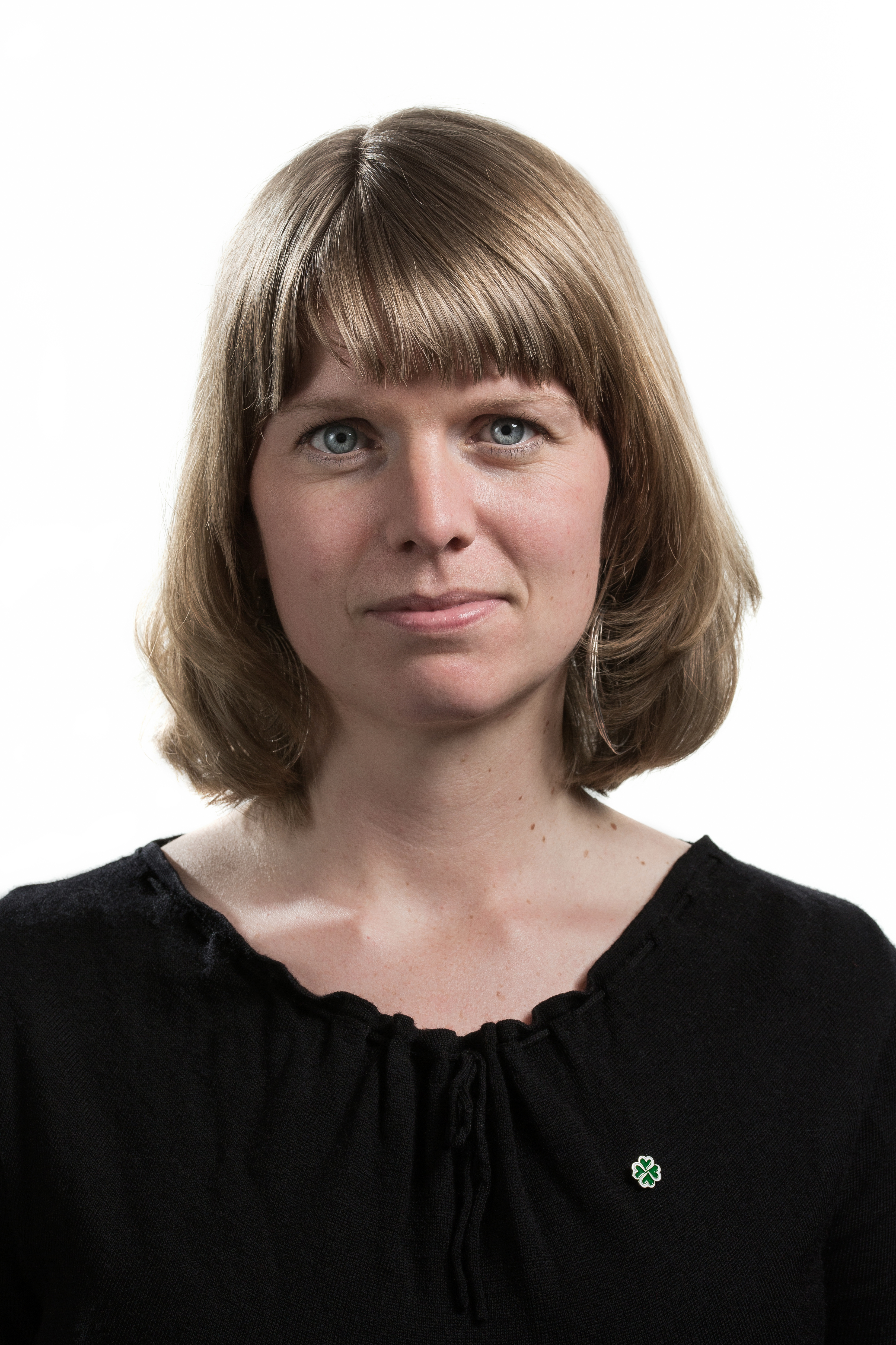 Ane Kismul, Oslo